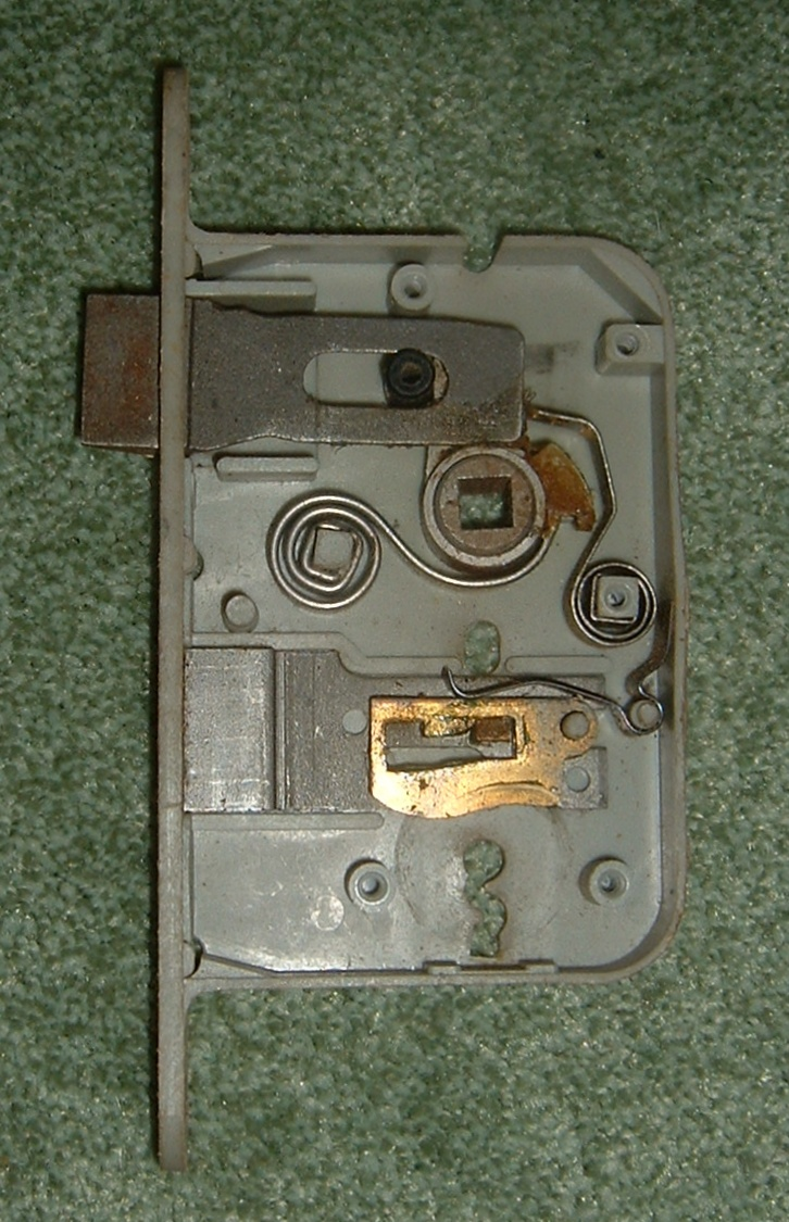 Klavierslot